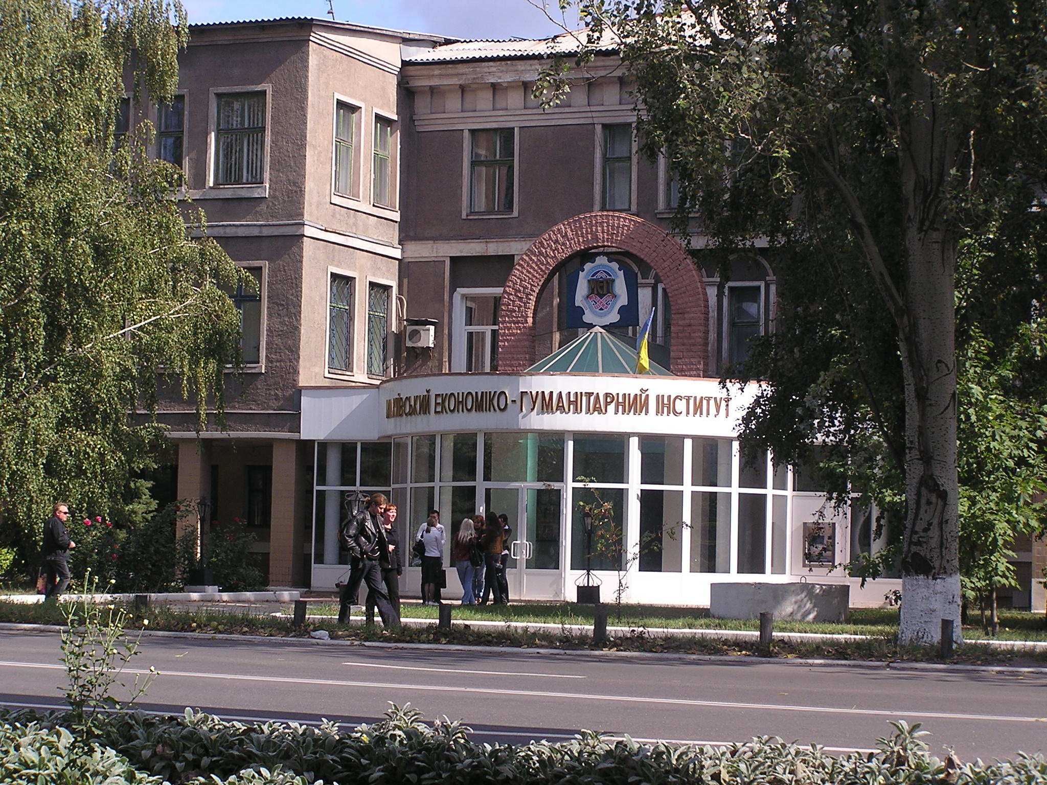 Макеевка